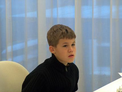 Magnus Carlsen (eigen foto)